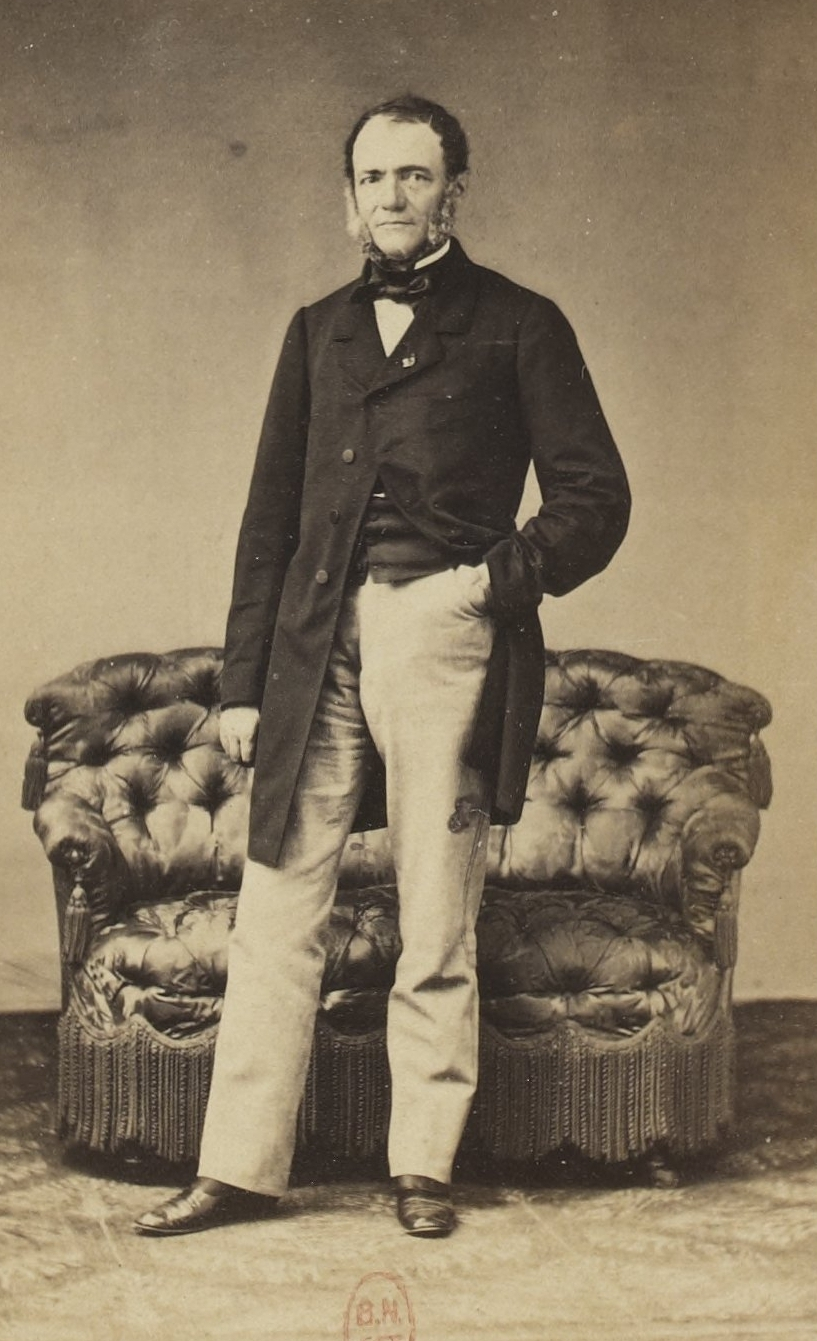 Album des députés au Corps législatif entre 1852-1857.